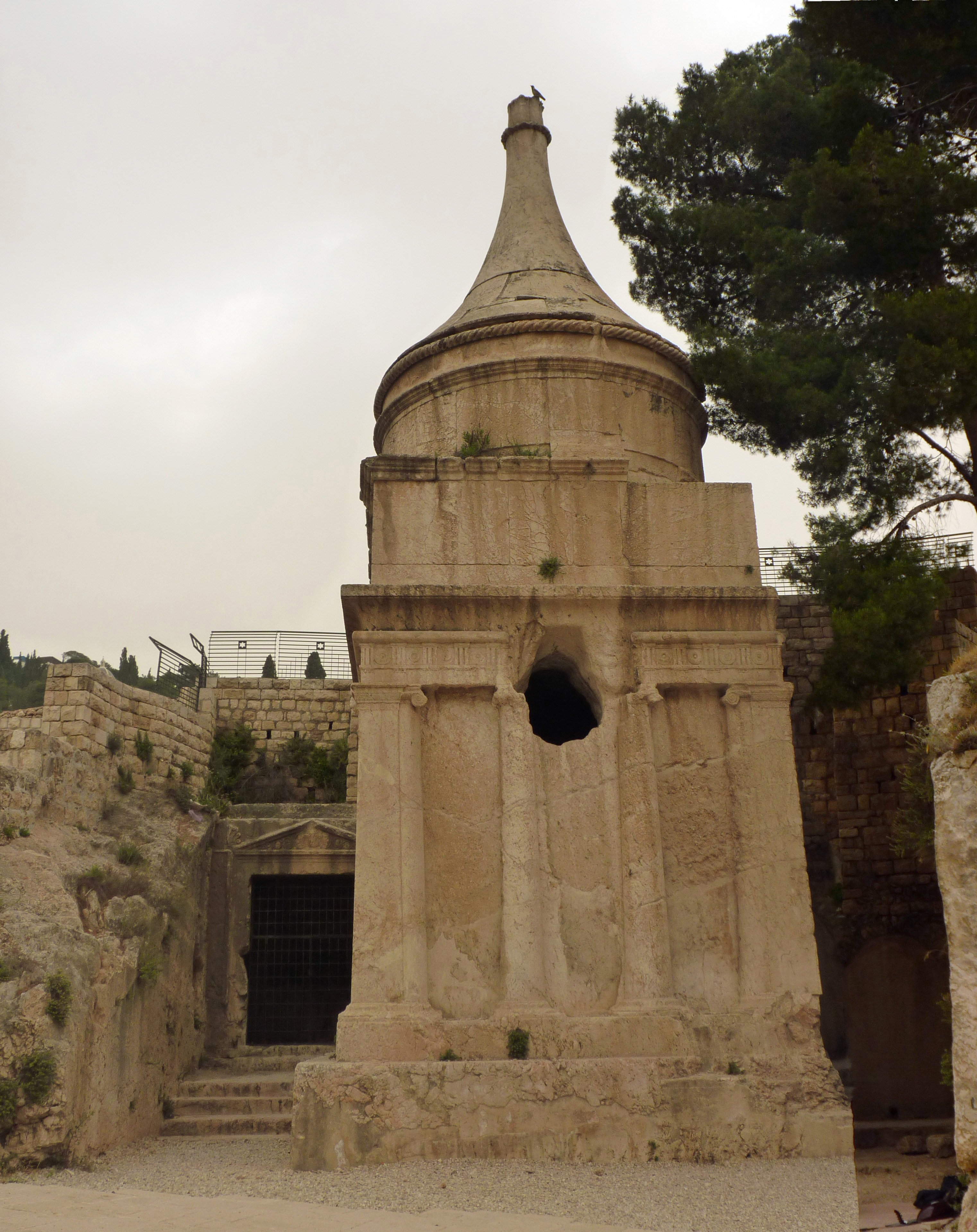 Panorama 7 ad Avshalom (Absalom´s Tomb) & Zecharia´s Tomb